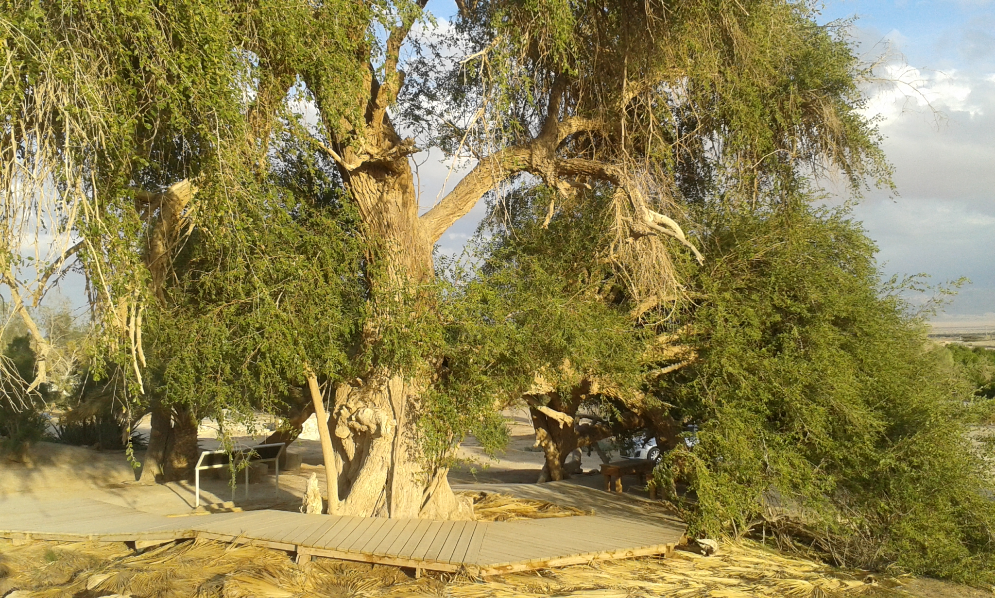 משטרת עין חוצוב - עץ השיזף